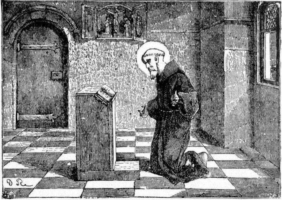 Saint Bademus